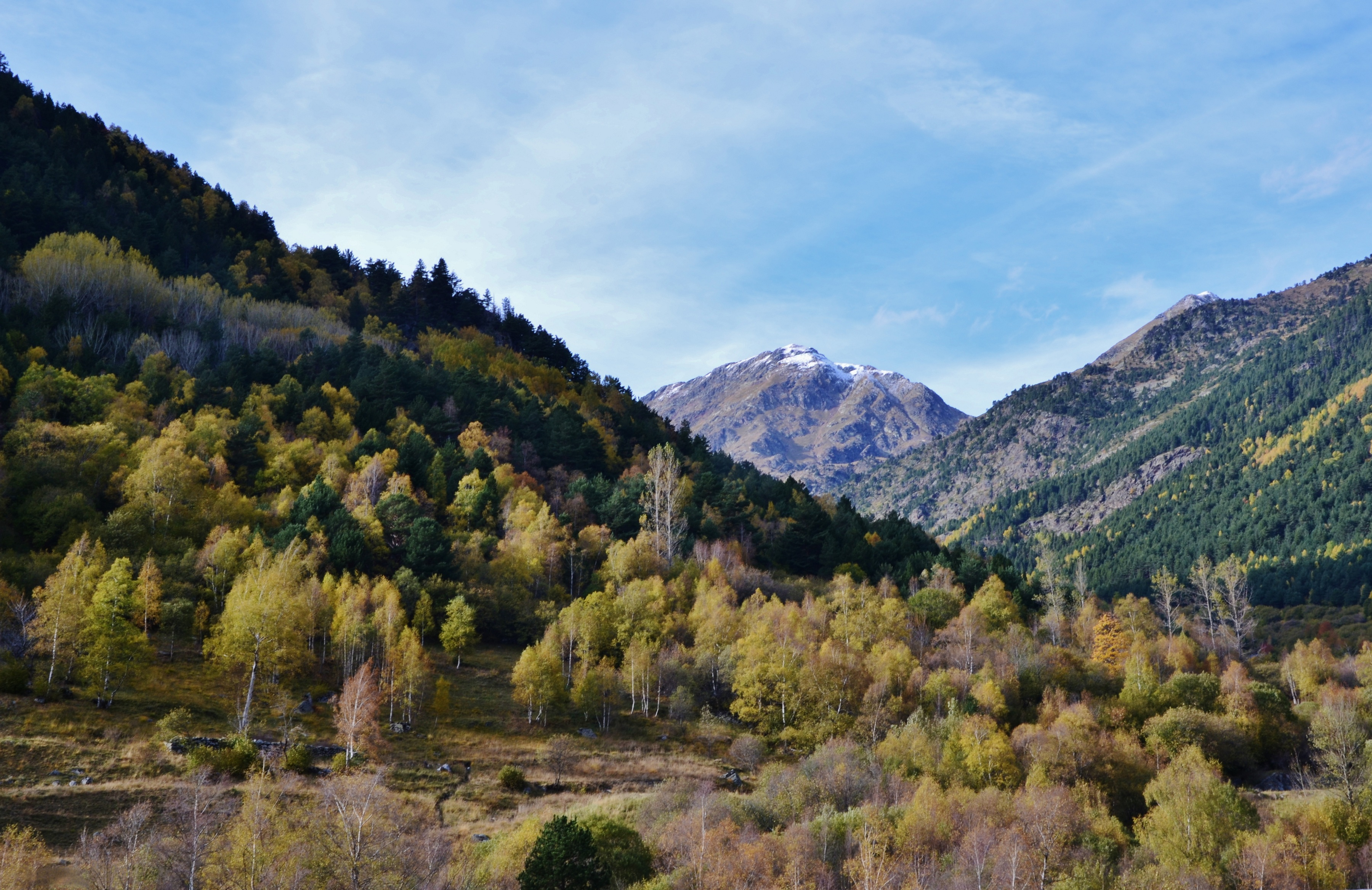 Valls del Comapedrosa (la Massana) This is a a photo of a natural area in Andorra with id: AD-PNCVC